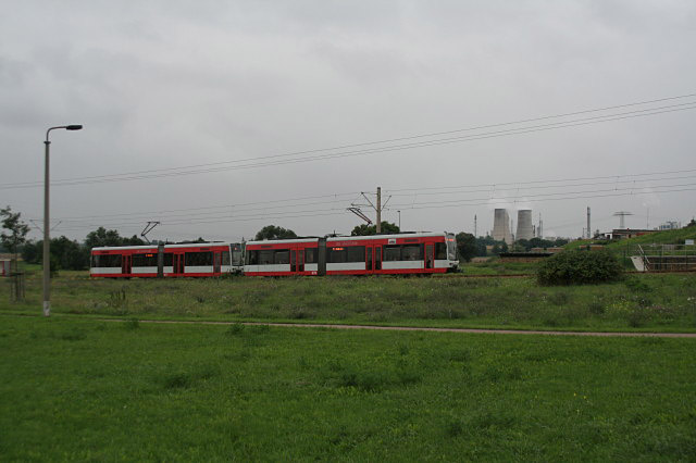 Daspig, mit Leuna Werke